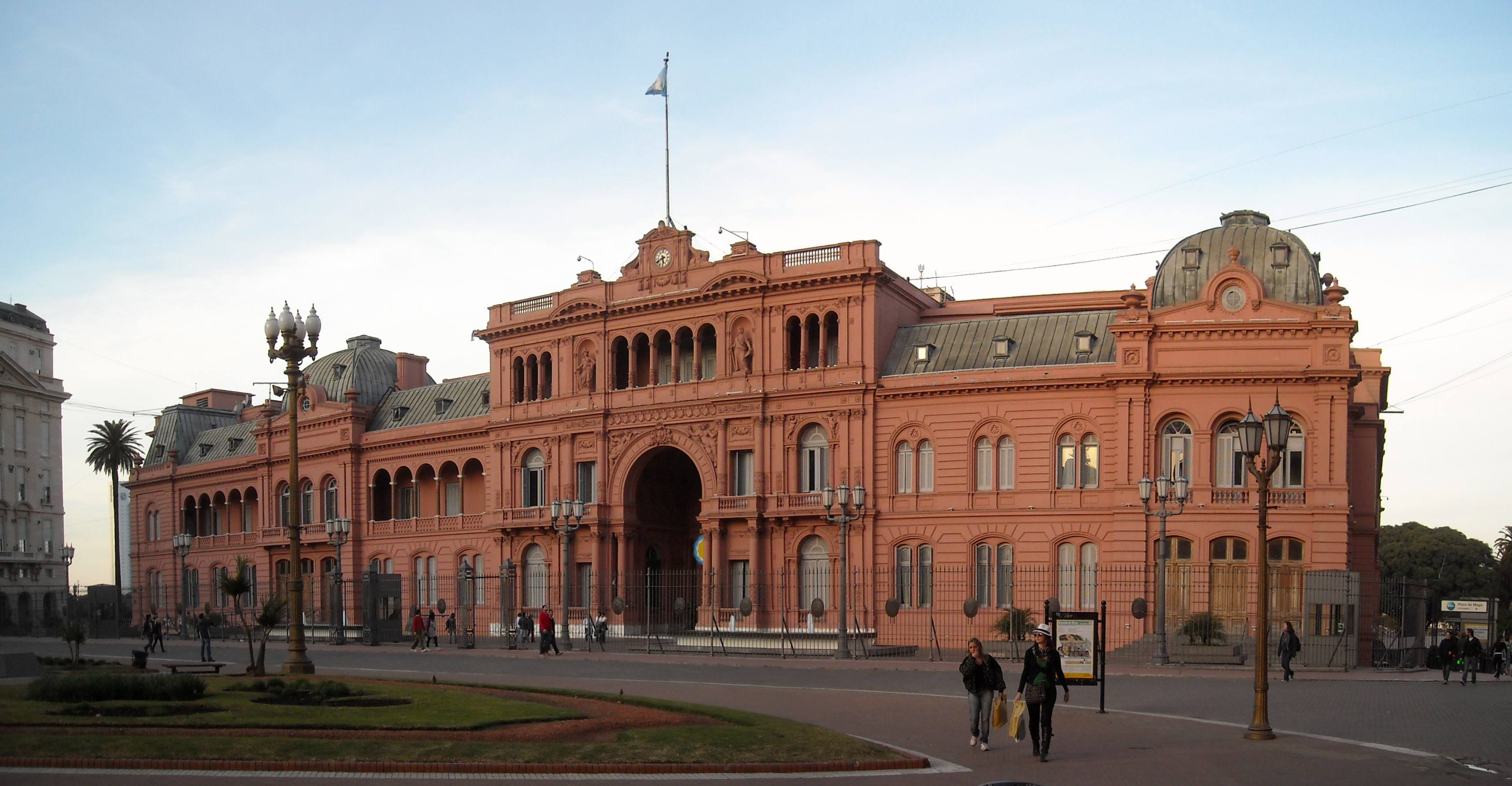 Casa de Gobierno